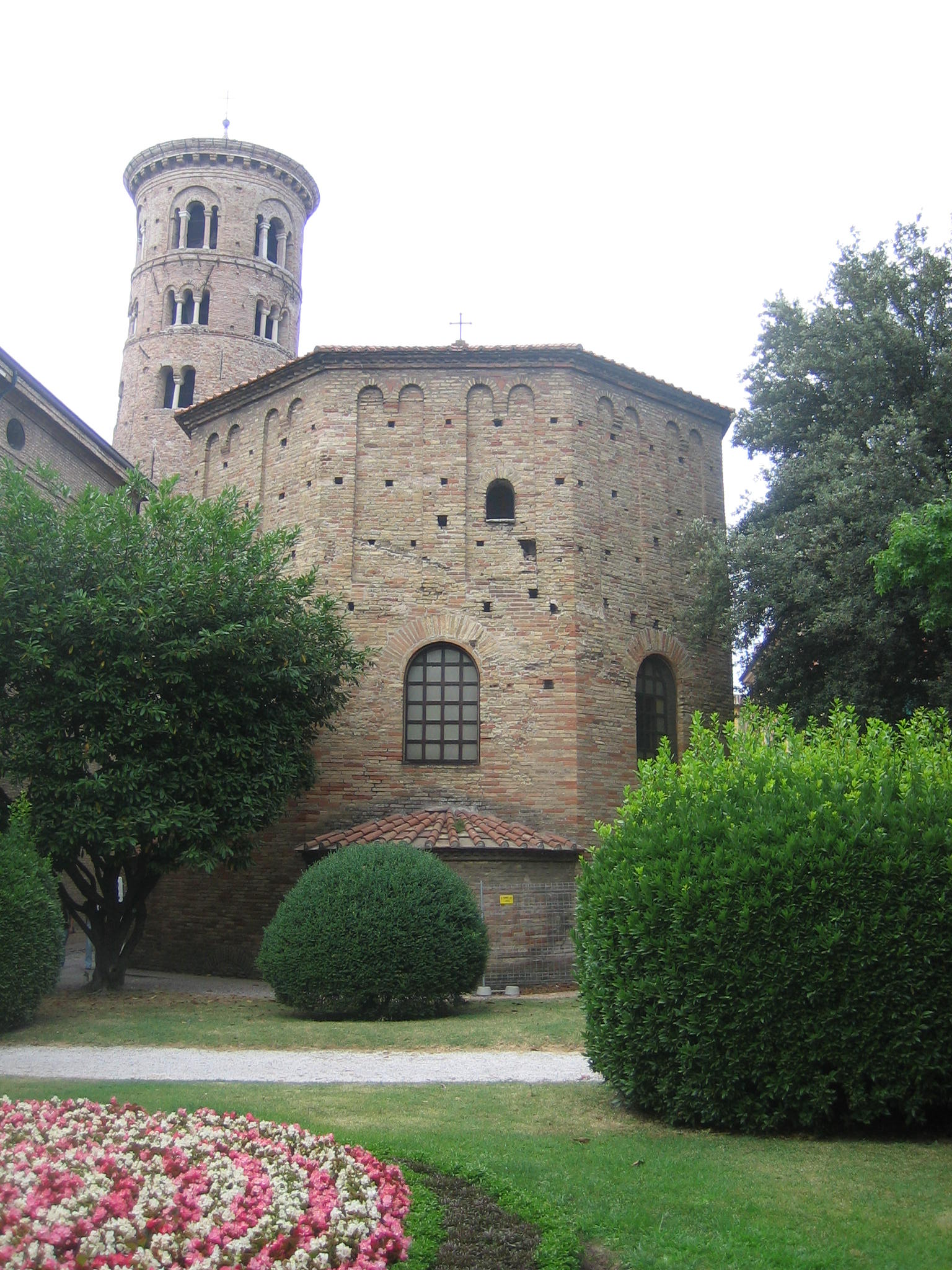 Baptisterium der Orthodoxen in Ravenna